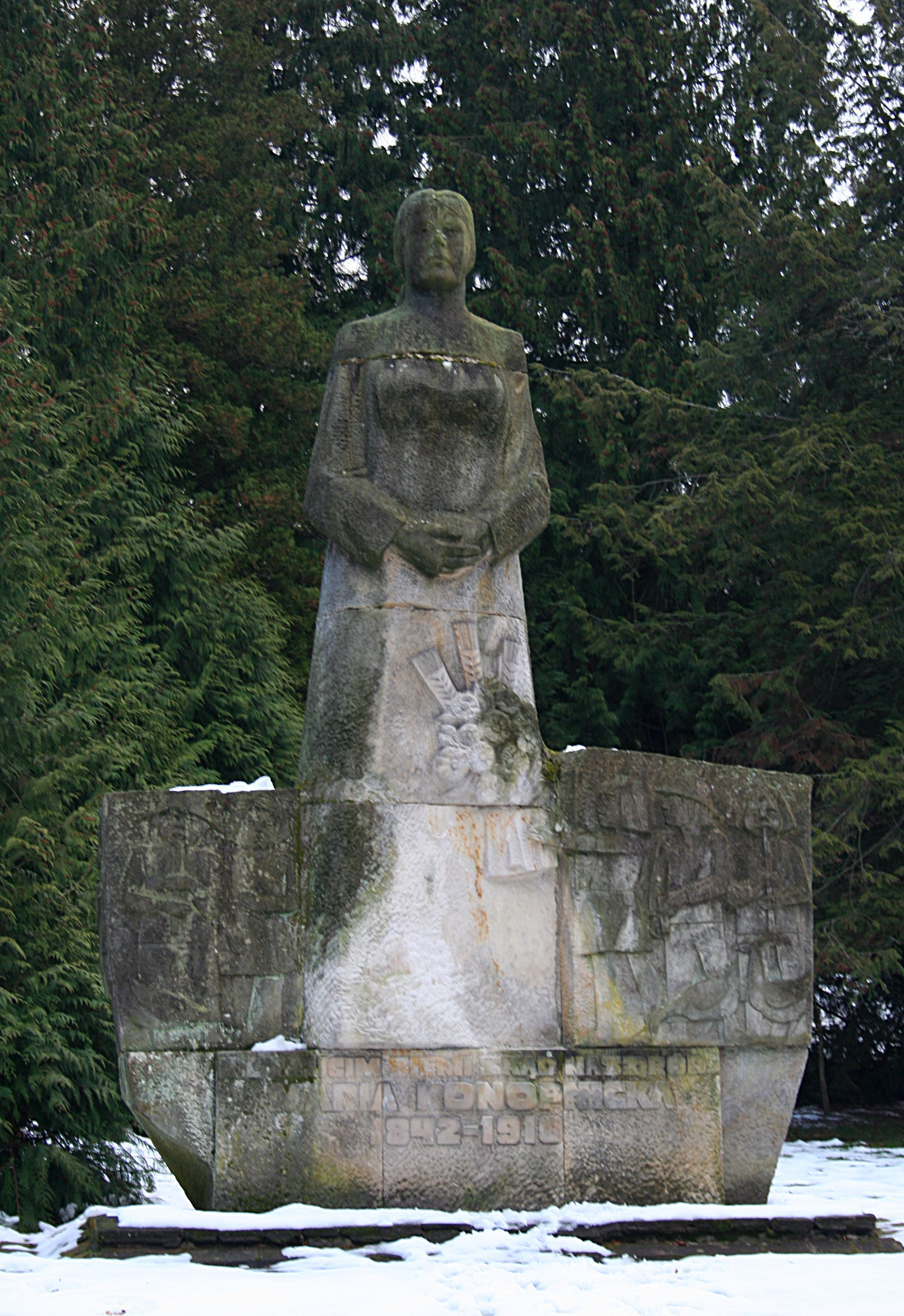 Warcino pomnik Marii Konopnickiej